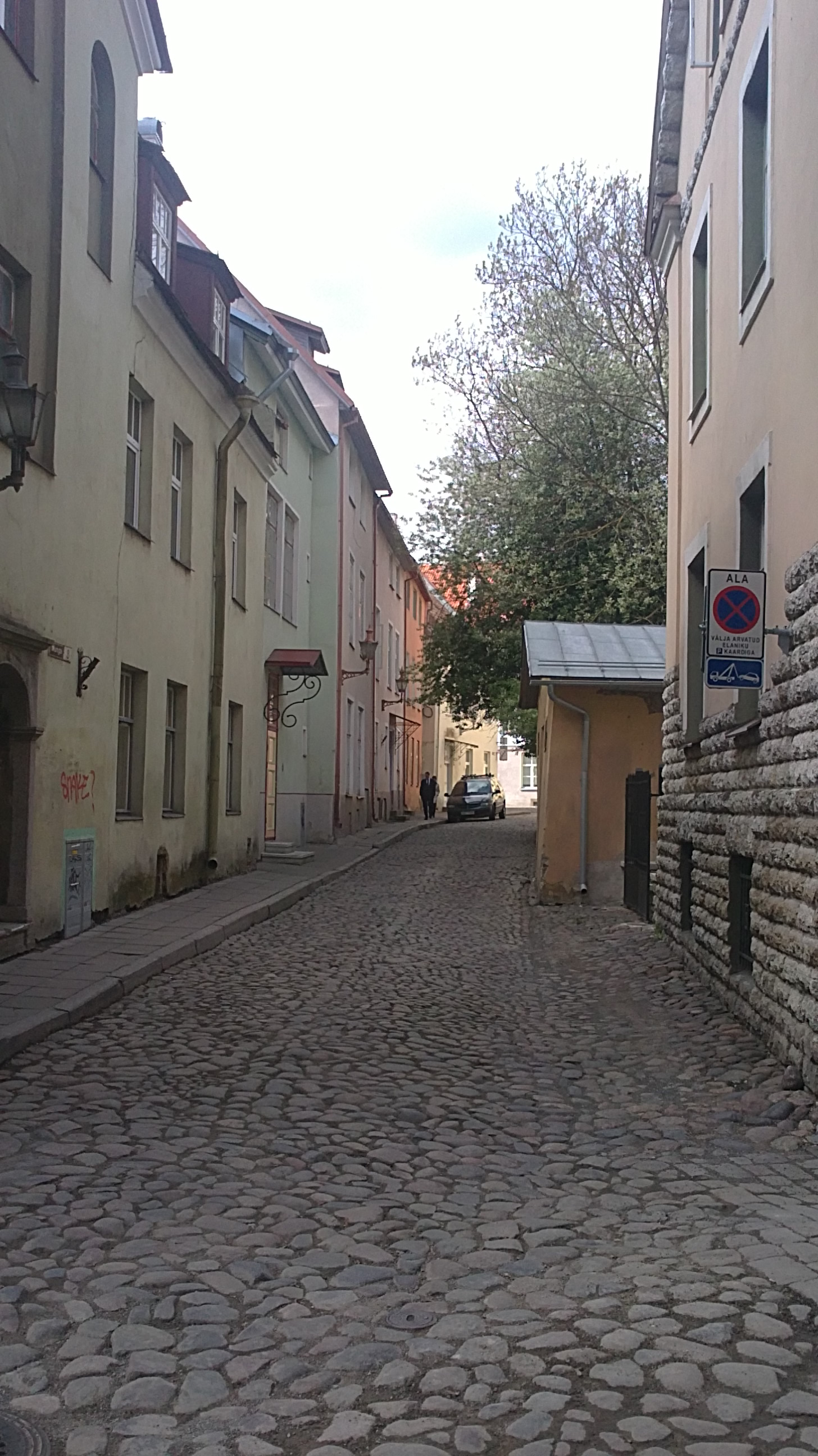 Tallinna vanalinnas asuv Munga tänav, vaade Müürivahe tänava poolt